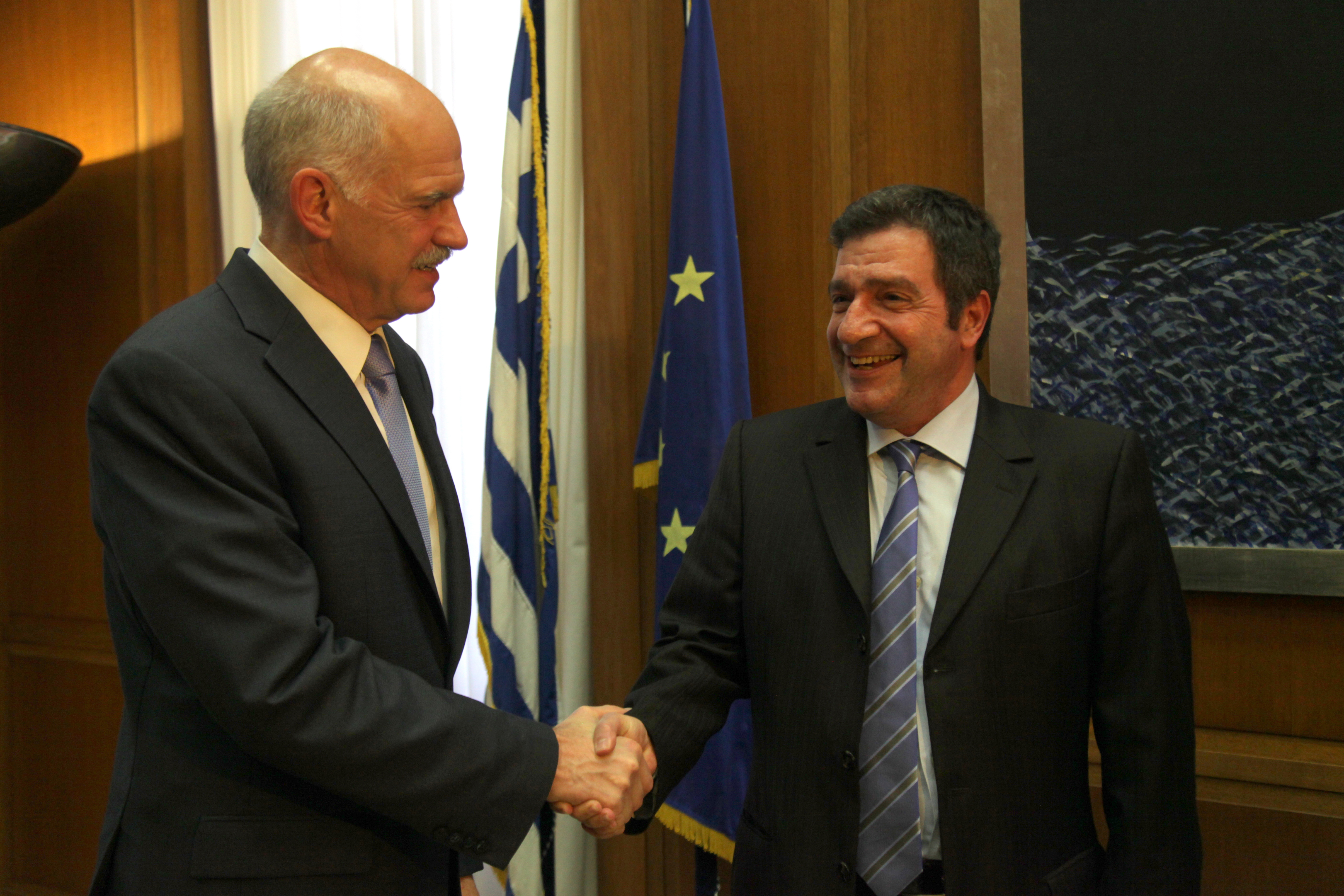 Γραφείο Πρωθυπουργού, Κοινοβούλιο 16 Μαΐου, 2011